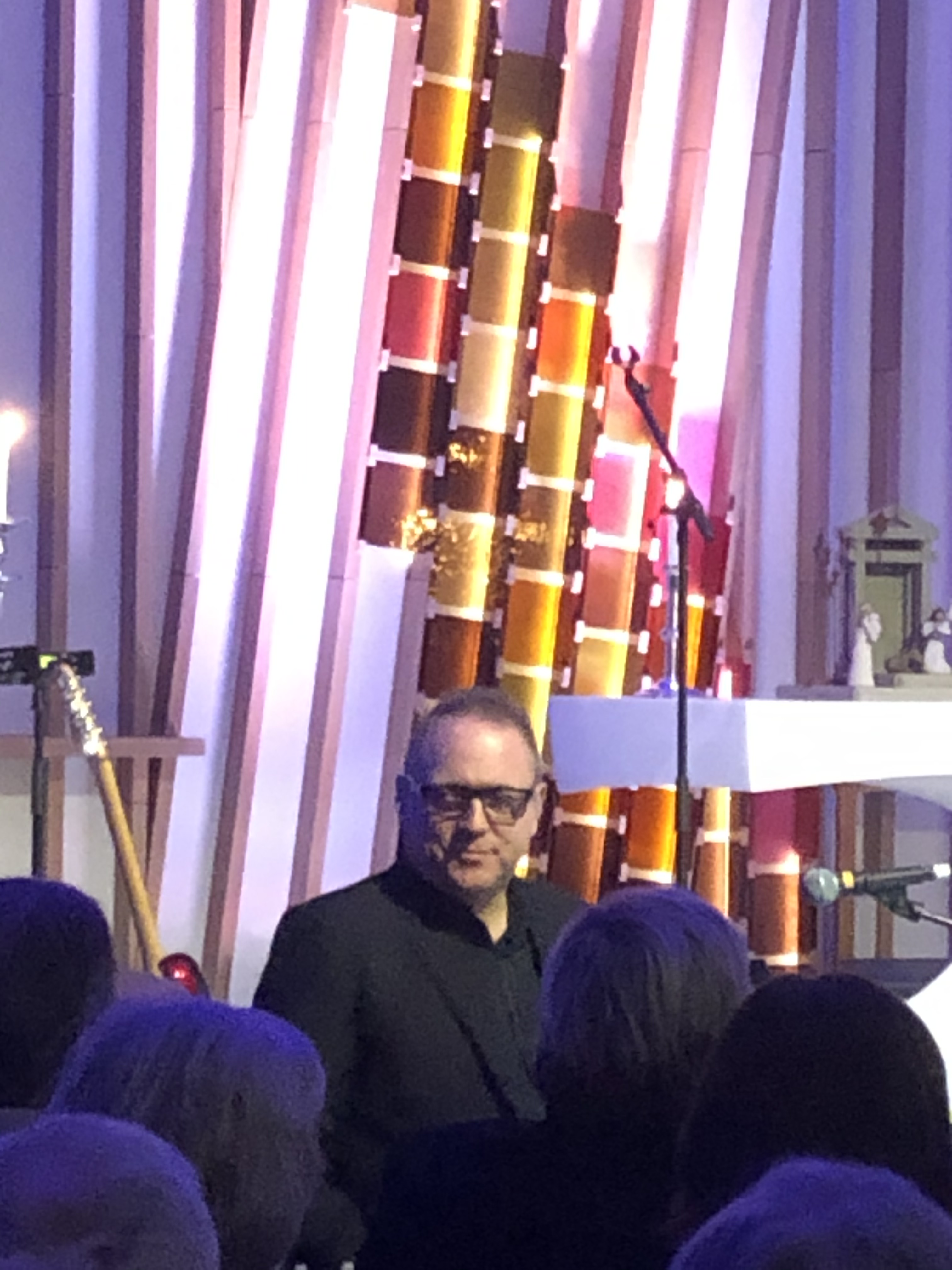 Trond Lien i Hønefoss kirke, 2019